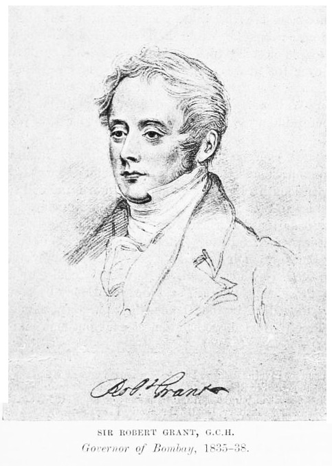 Robert Grant (1779-1838)